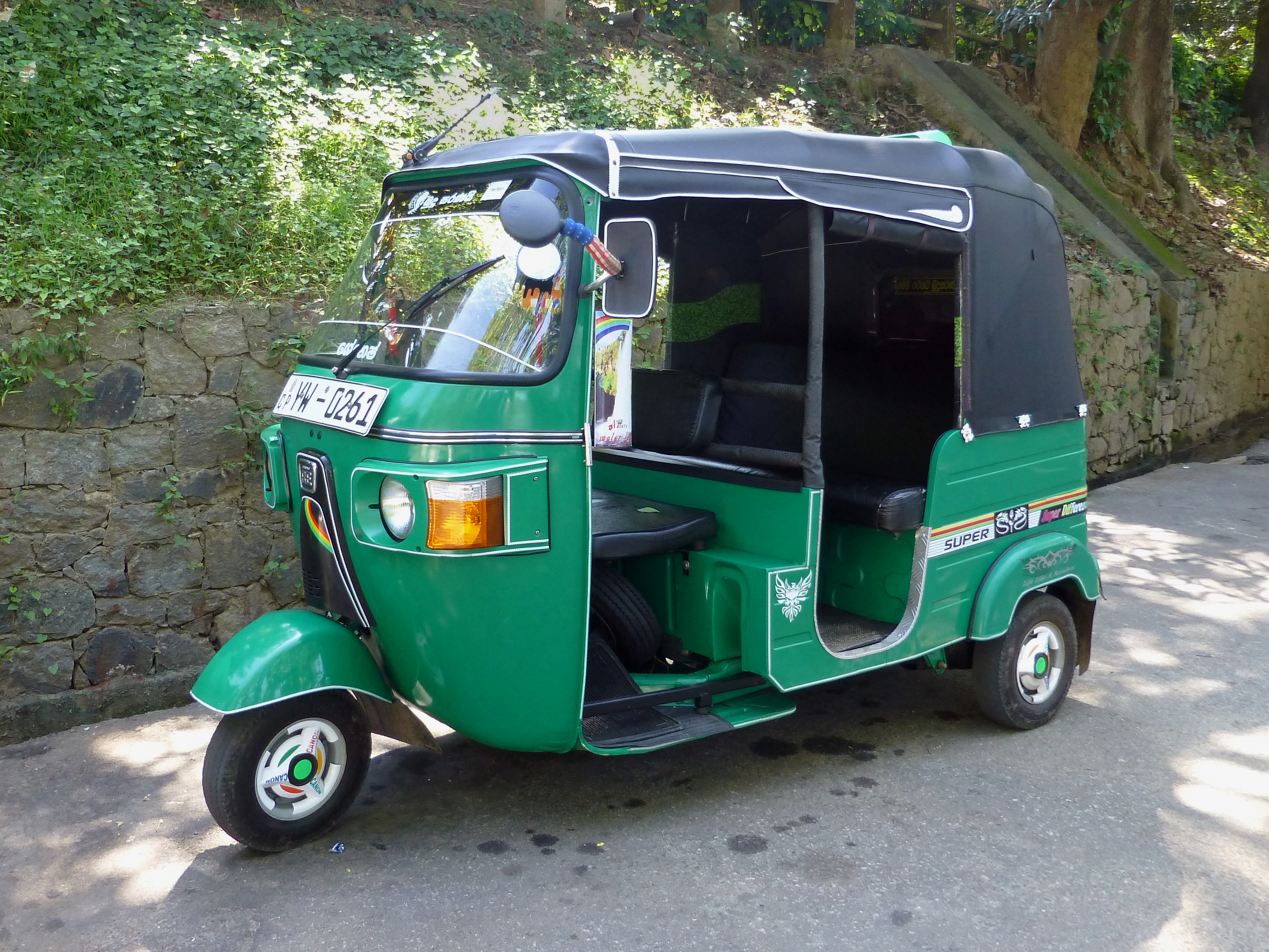 Tuk-tuk à Kandy (Sri Lanka)